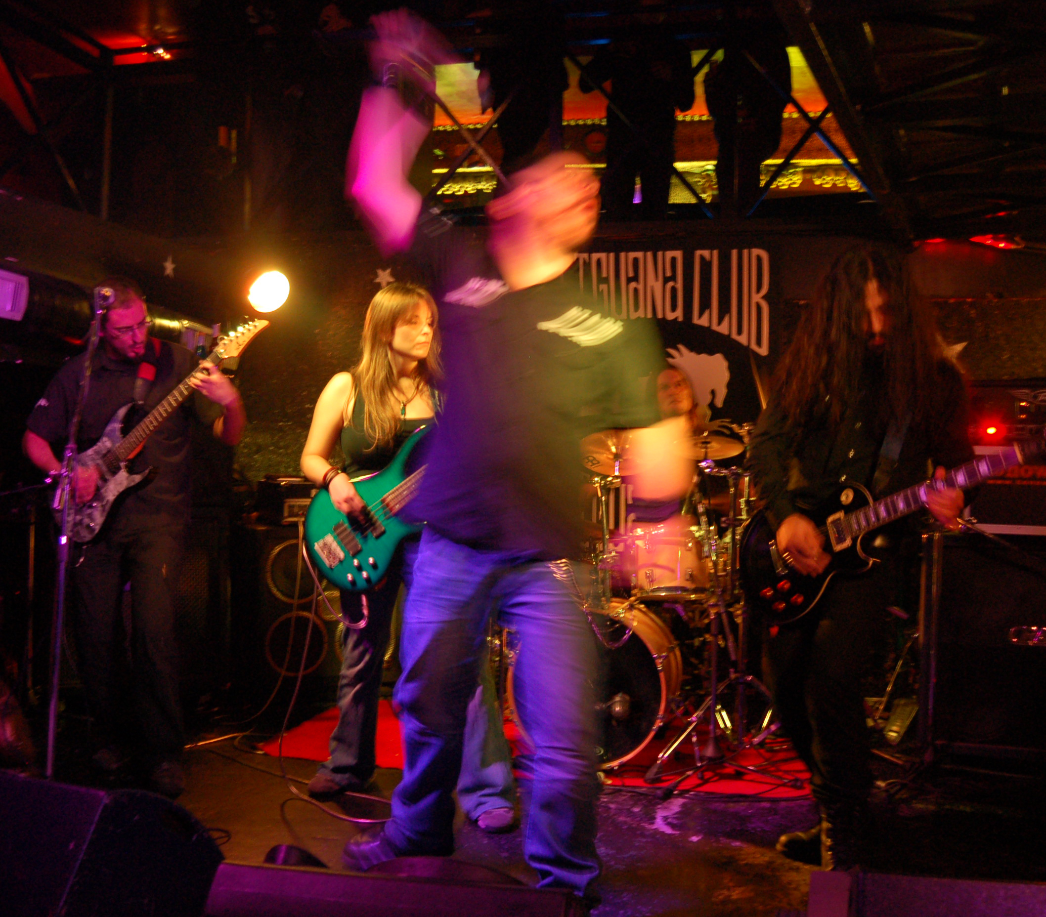 Orfos en concerto na Sala Iguana de Vigo